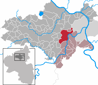 Kobern-Gondorf in Rhineland-Palatinate - district Mayen-Koblenz